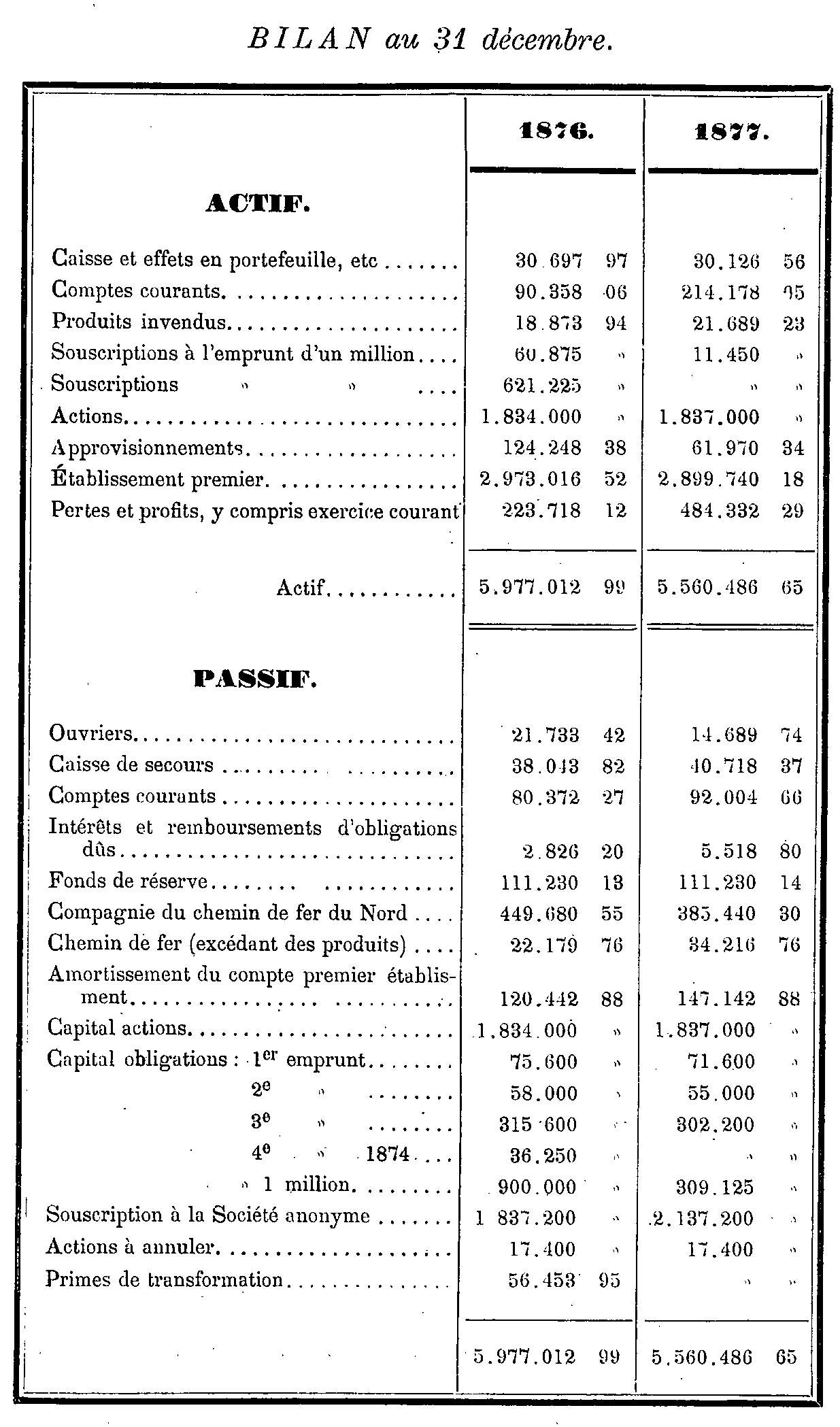 Bilans comptables au 31 décembre 1876 et 1877 de la Compagnie des mines de la Lys-Supérieure.